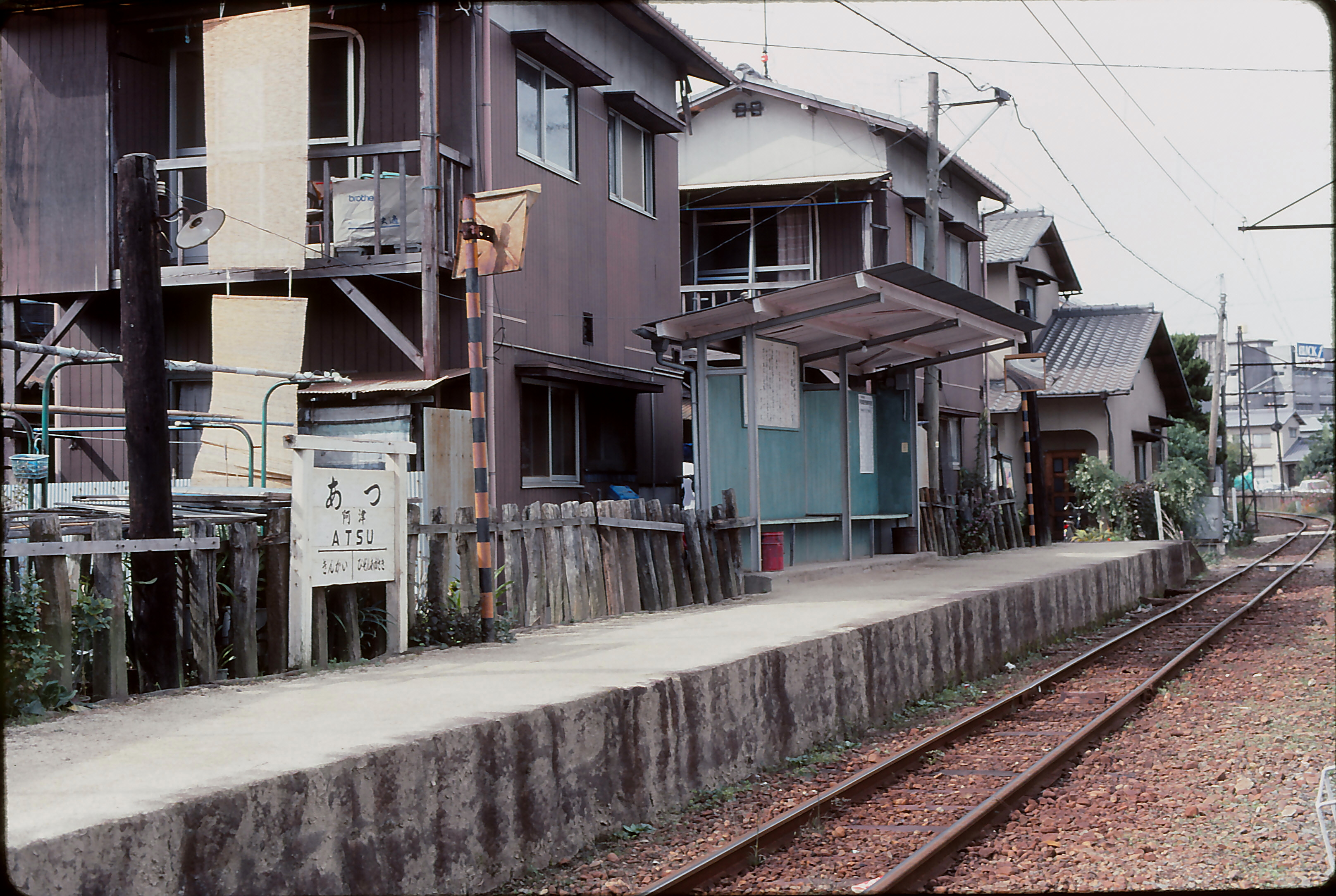 下津井電鉄阿津駅